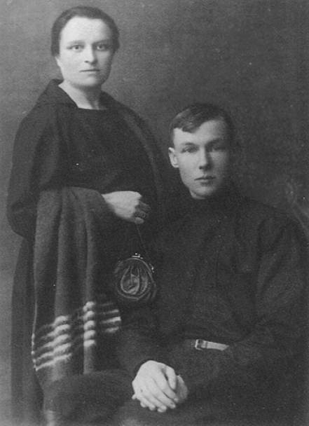 Беларуская (тарашкевіца): Юрка Лістапад з жонкай Марыяй (Сагановіч), 1920-я